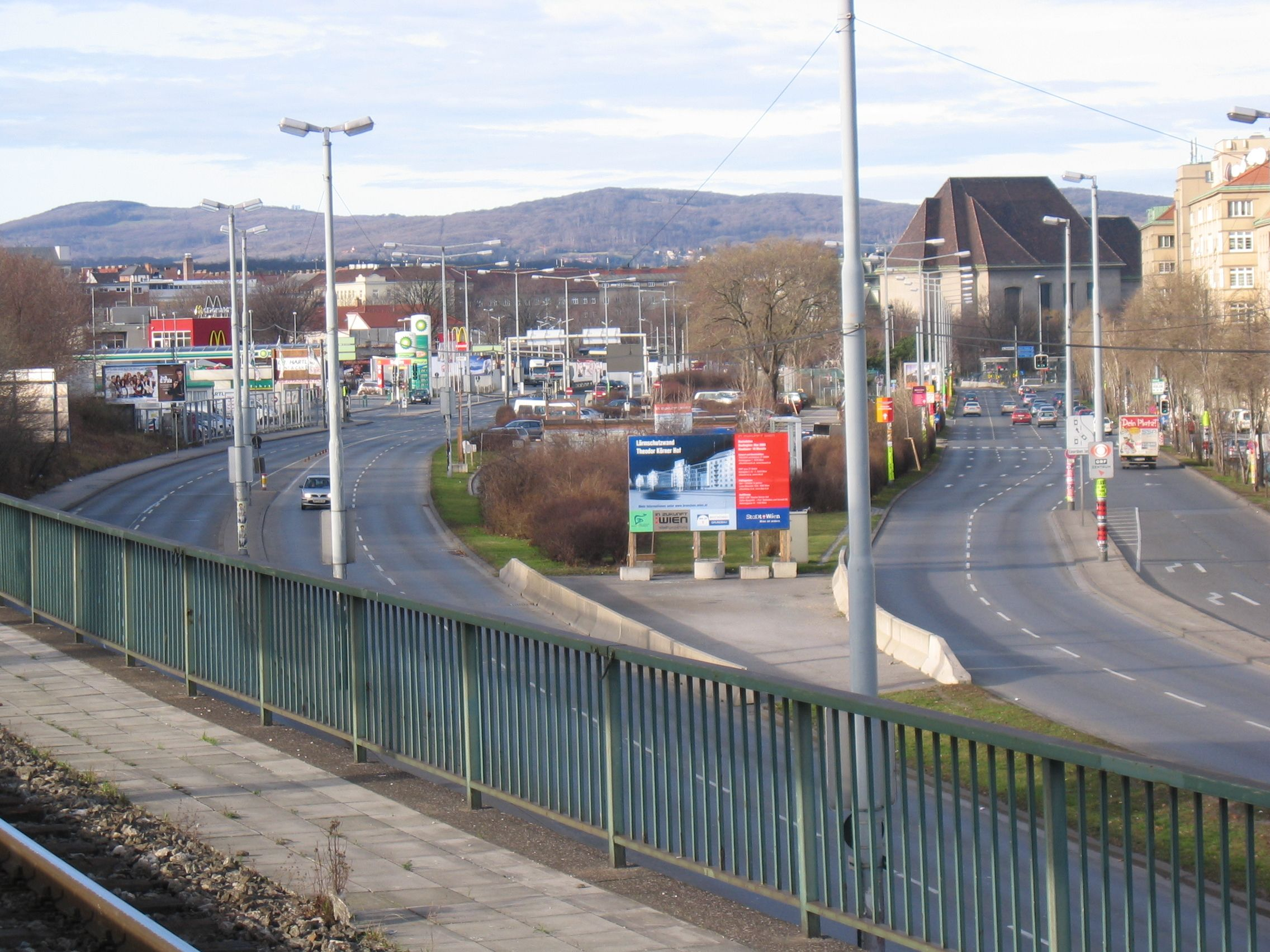 Margaretengürtel